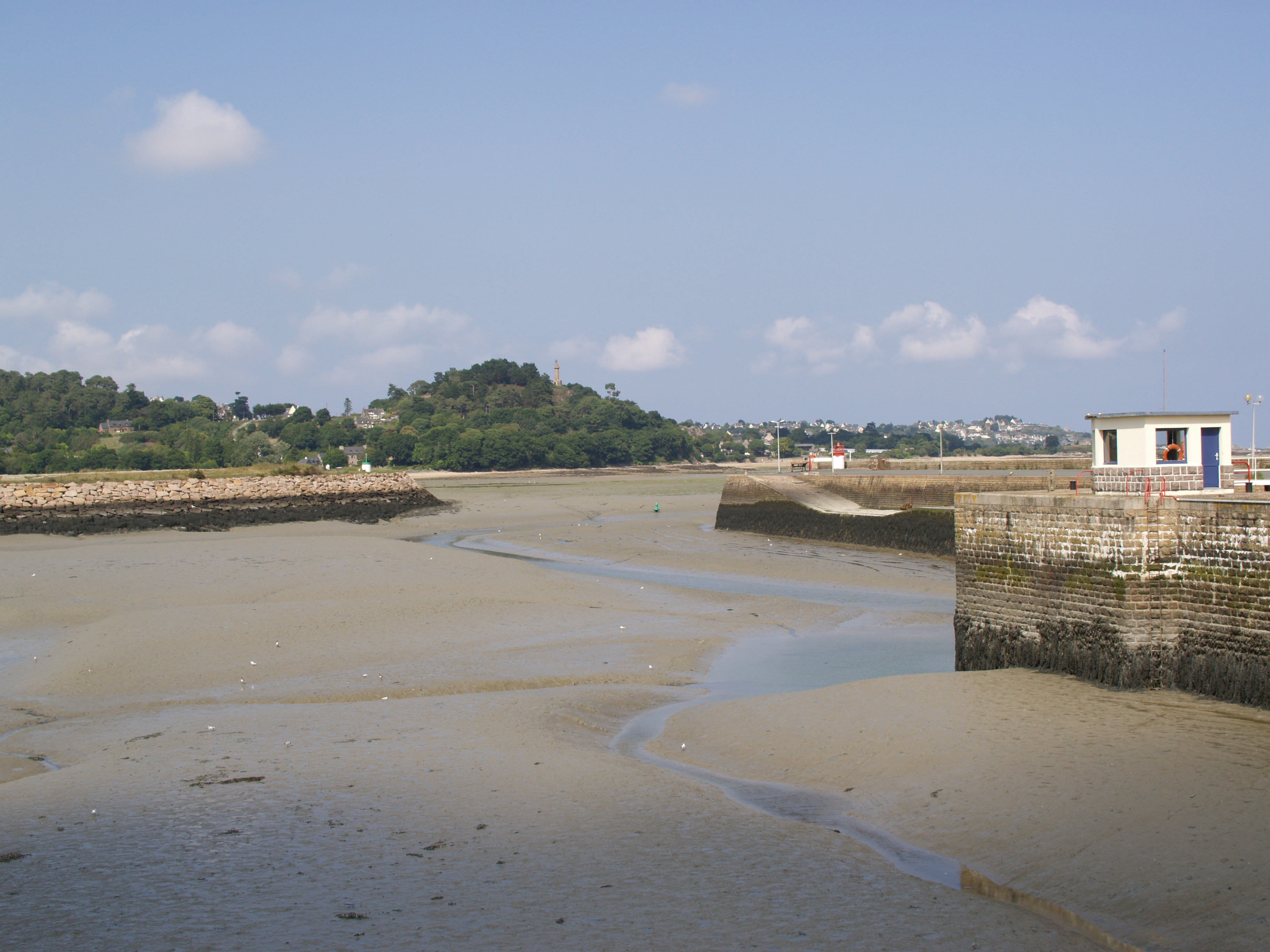 Paimpol, Bretagne, France. Vue vers le nord-est depuis le quai Pierre Loti à la sortie bateaux du port de Paimpol. Sur la gauche, le quai en pierres de la zone industrielle des Salles, avec le ruisseau du Traou se déversant tout contre ce quai ; on aperçoit son chenal longeant le mur de pierres du quai. Le chenal sortant de derrière le premier mur à droite est celui du Quinic. Tour de Kerroc'h sur le mont en arrière-plan au centre. A gauche de la tour, le hameau de Lezvellec. A droite de la tour : proches du niveau de la mer, Kerroc'h puis Kervrannec ; au même niveau mais en hauteur, Ploubazlanec ; et sur la hauteur la plus à droite, Perros-Hamon. Le territoire immédiatement derrière le quai des Salles est sur Ploubazlanec.